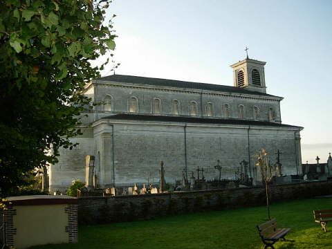 église de Saint-Jean-de-Bonneval, Aube